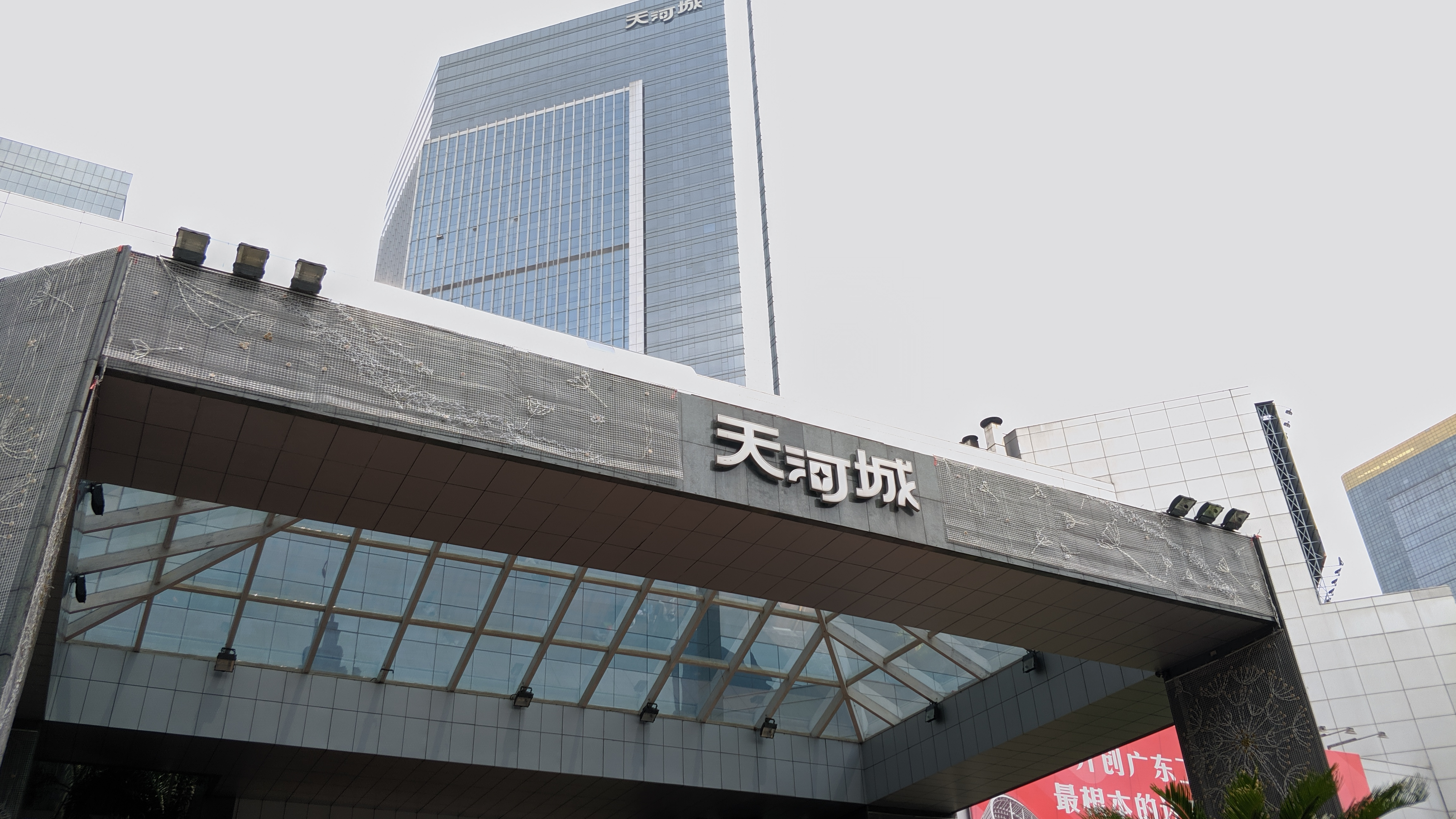 广州天河城正门牌坊